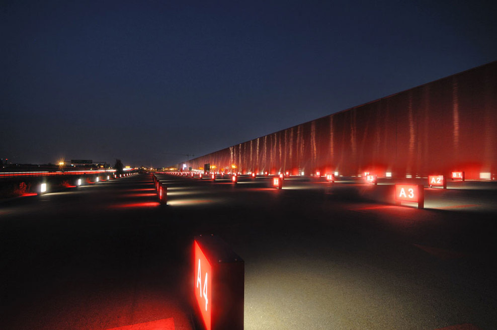 kilometro rosso vista notturna